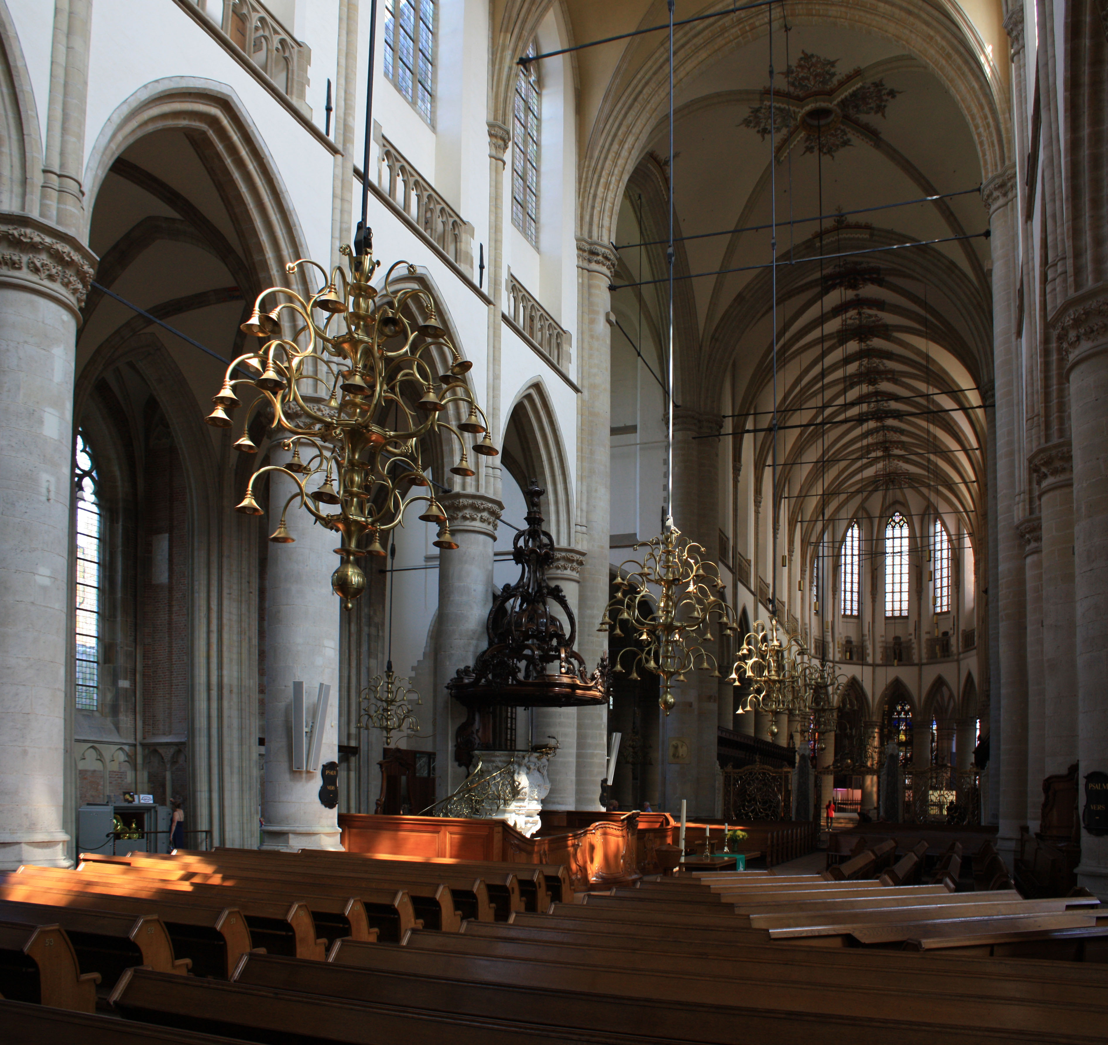 Interieur van de grote kerk van Dordrecht